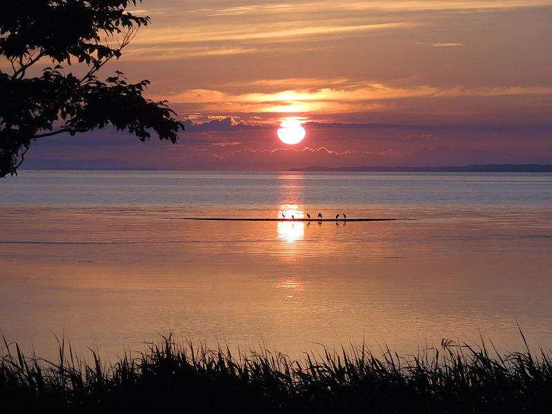 サロマ湖に沈む夕日(常呂町より撮影)